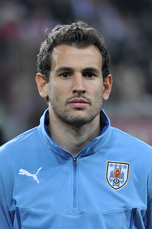 Freundschaftliches Länderspiel Österreich - Uruguay am 5. März 2014 in Klagenfurt: Christian Stuani